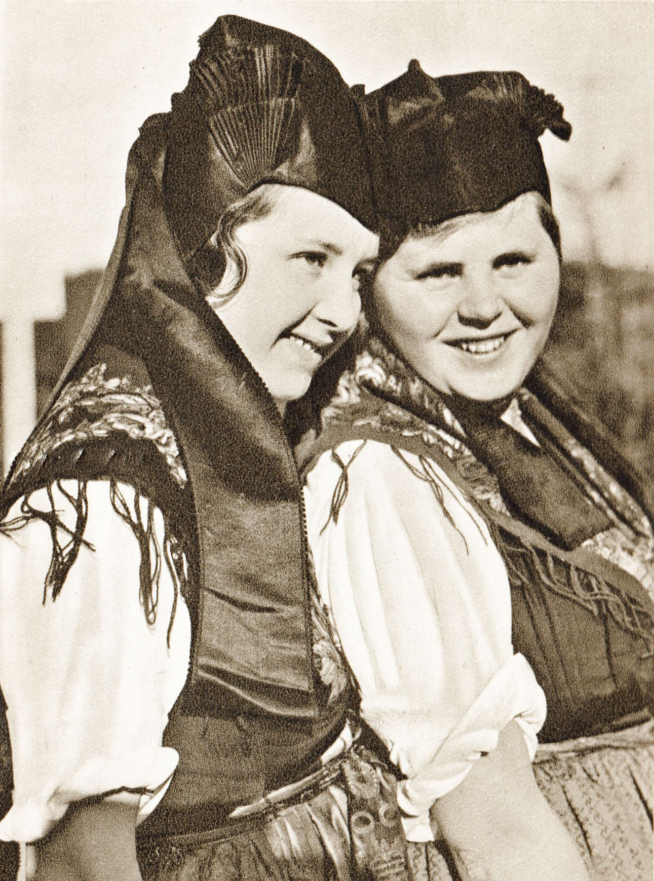 Tracht in Finsterbergen (um 1930)